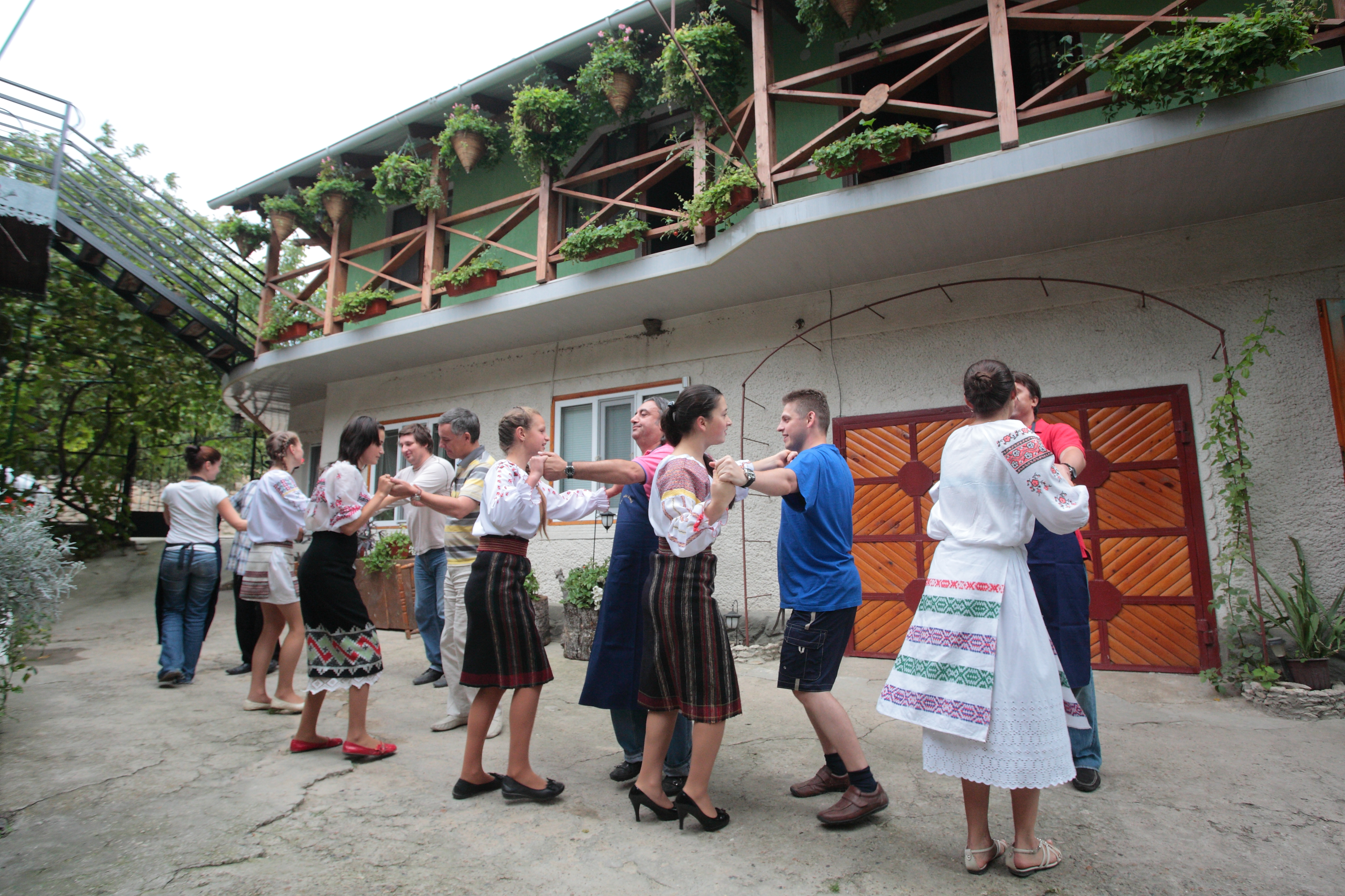 Moldova Orheiul vechi Casa din lunca